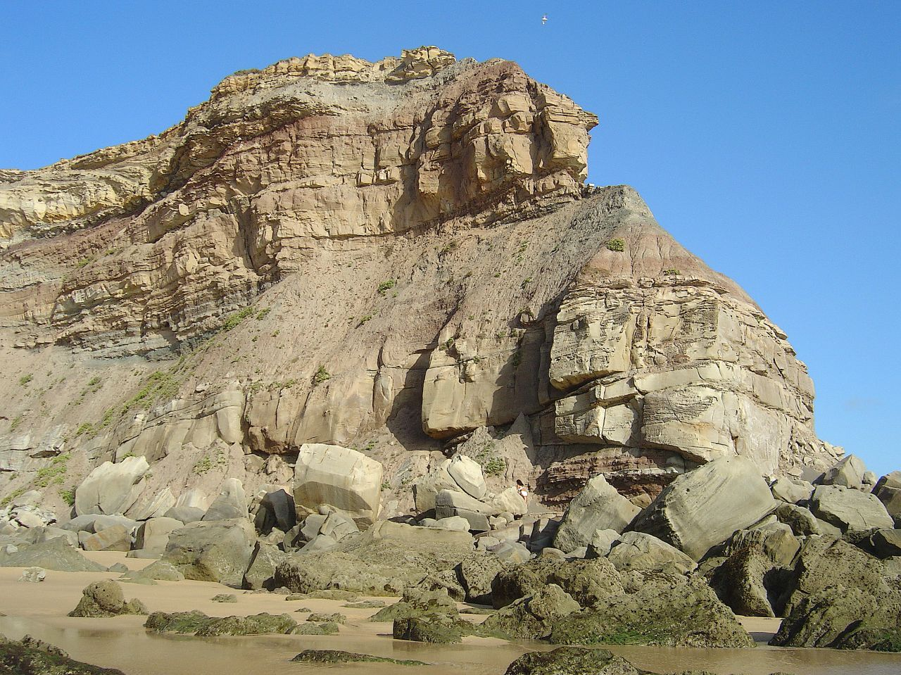 Lourinhã